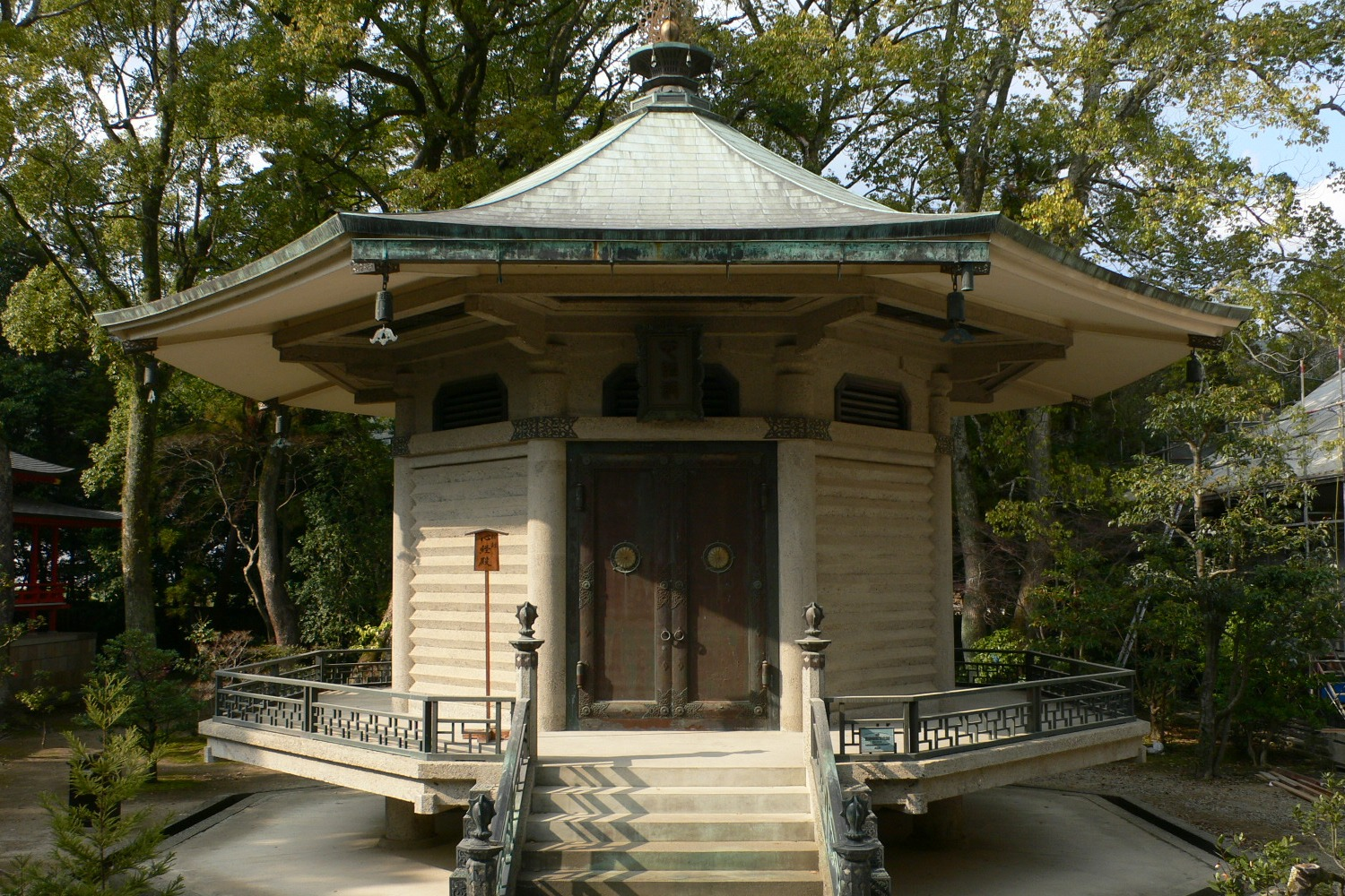 Daikaku-ji (Shinkyoden:心経殿)